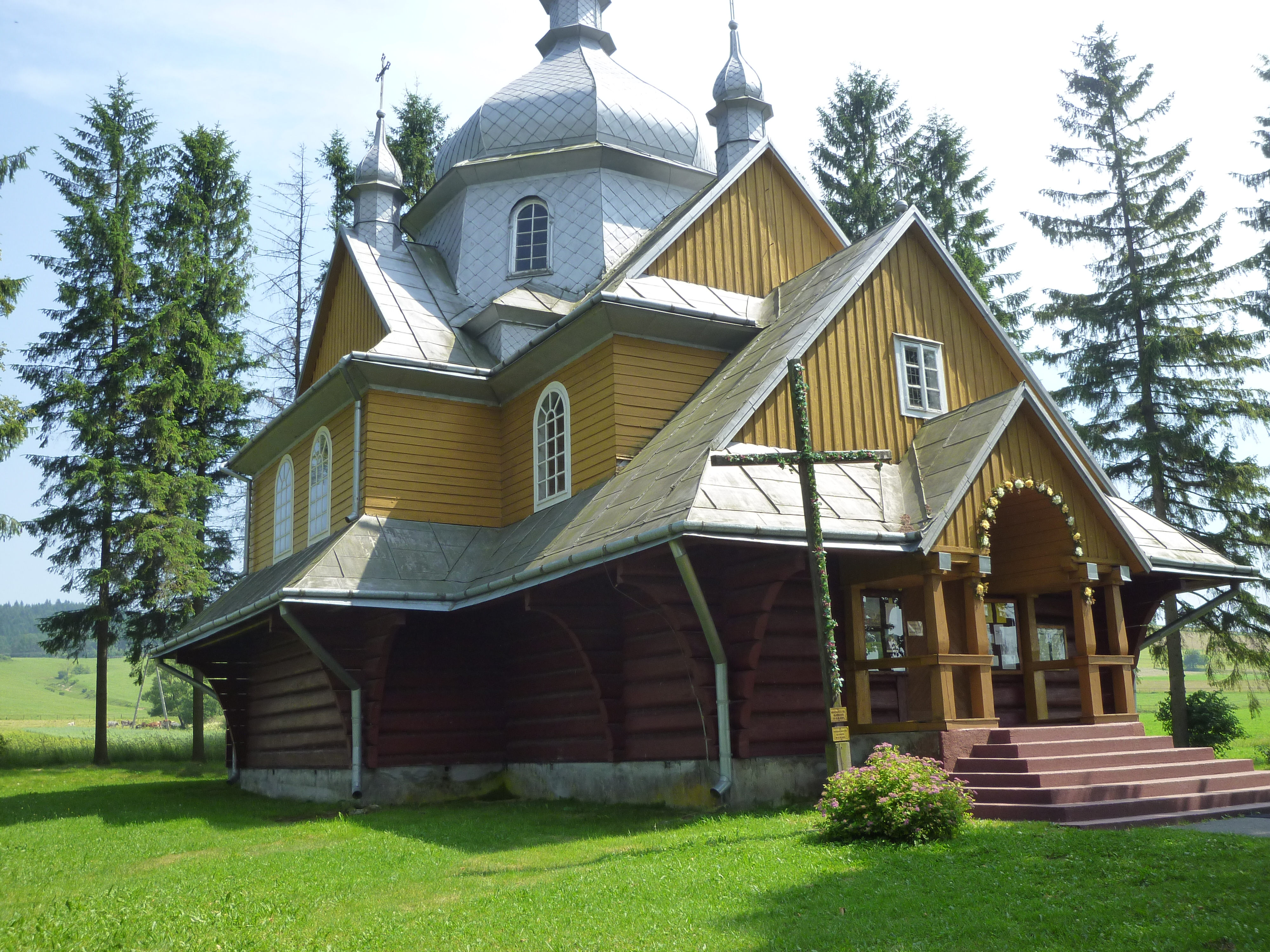 Cerkiew Wniebowstąpienia Pańskiego w Gładyszowie